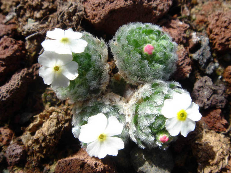 Androsace muscoidea 'Breviscapa'